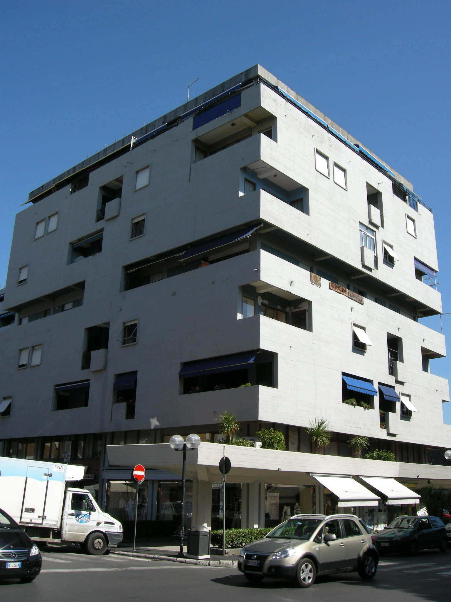 Consominio di via venezia (marina di Carrara)